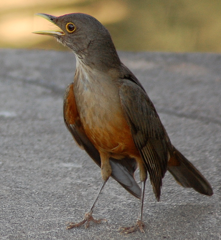 Parque da Independência, Museu do Ipiranga, São Paulo